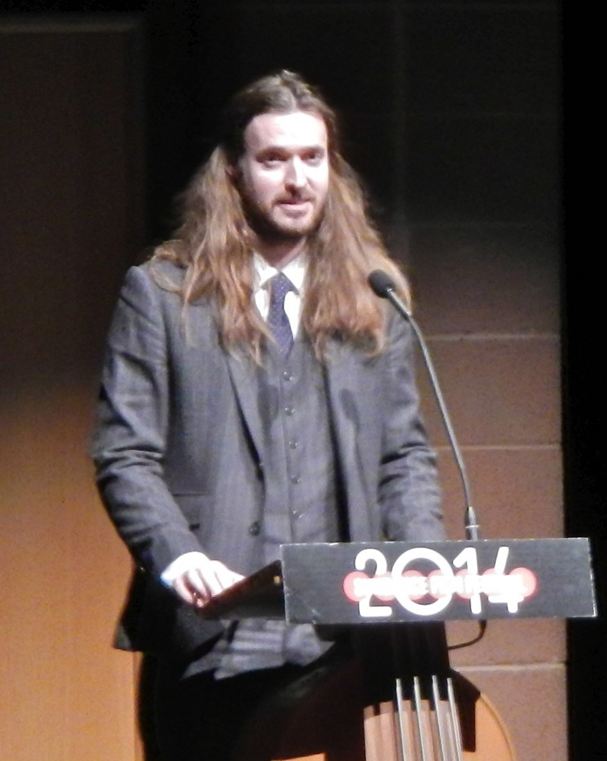 Майк Кэхилл на фестивале "Сандэнс" в 2014 году